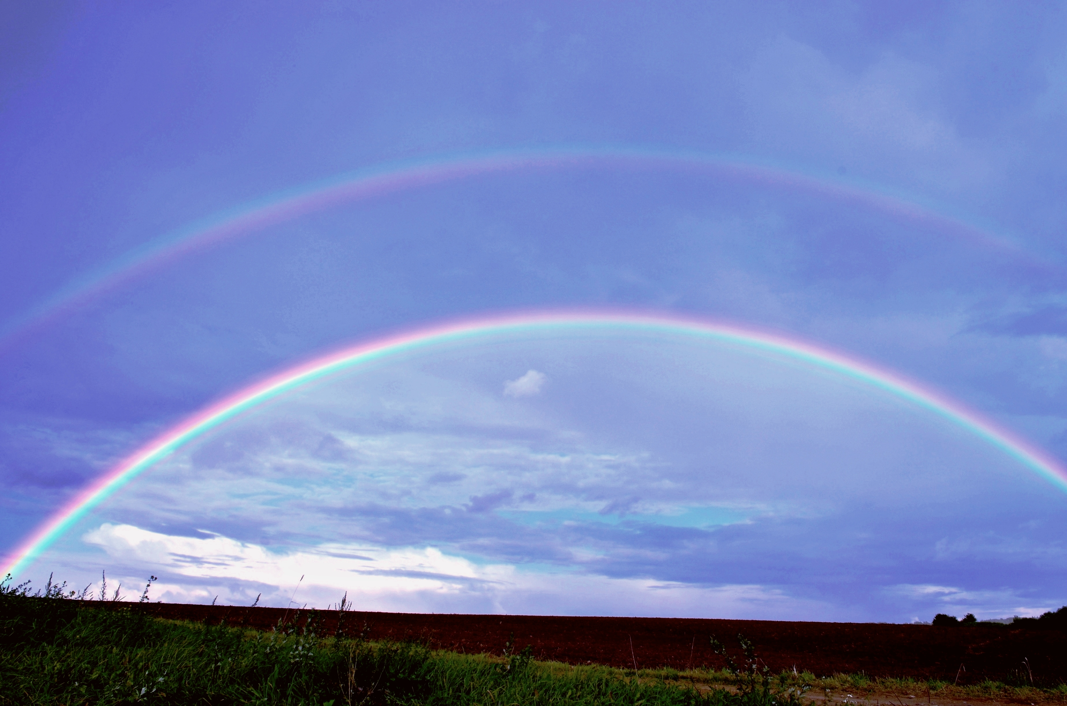 Dviguba vaivorykštė. Rezgiai, Kėdainių r.